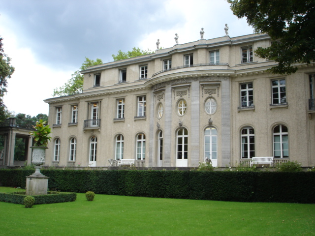 Berlin, Villa der Wannseekonferenz, Wasserseite